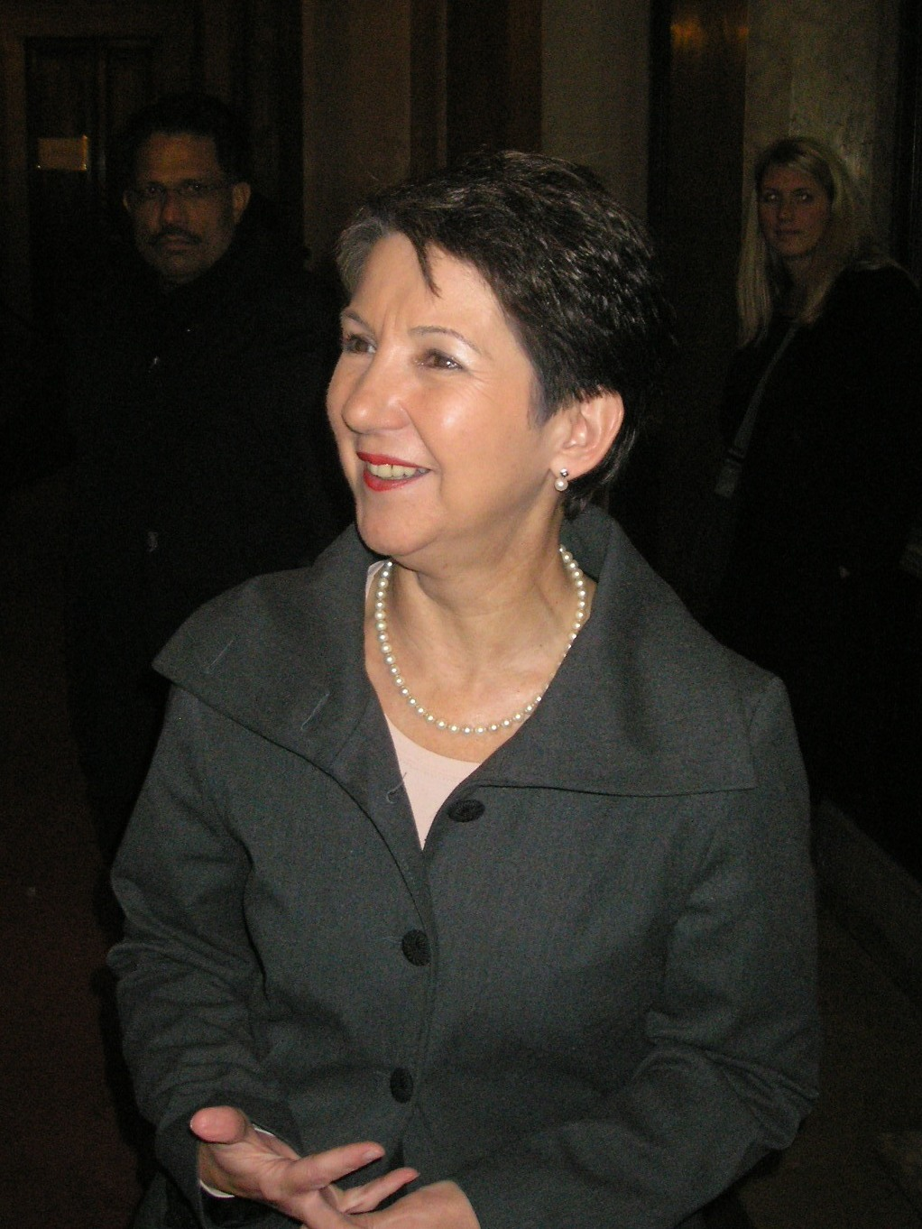 Barbara Prammer at parliament building in Vienna.